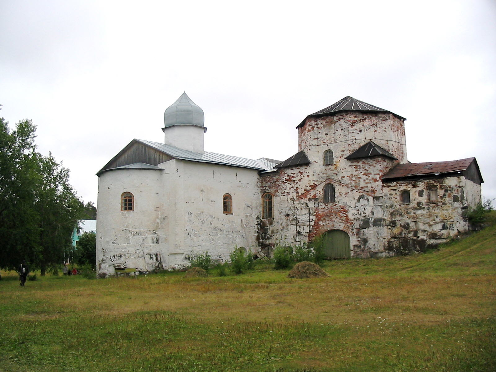 Kiy-island (Кий-остров), White Sea, Russia Onega Monastery of the Cross (Онежский Крестный Монастырь) Church of the Virgin's Nativity Церковь Рождества Богородицы (1689) July-August 2006